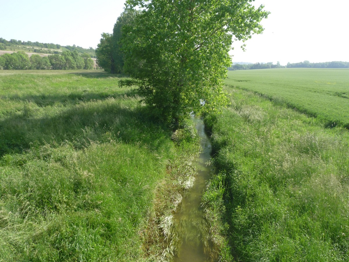 L'Ecly, pont sur la D.10, Aubeville et Etriac, Charente, France; vue vers l'amont